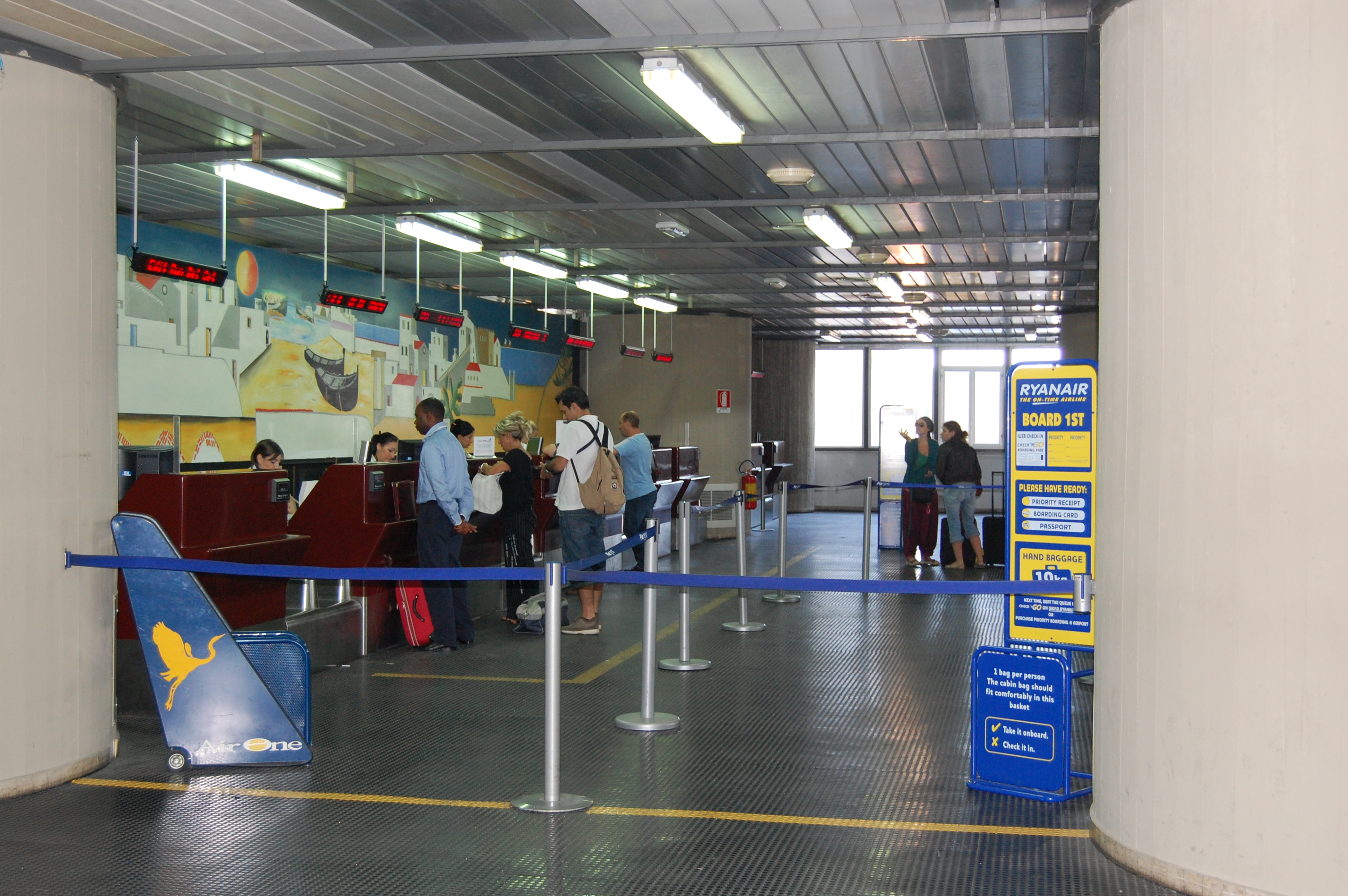 L'Aeroporto di Trapani-Birgi, Trapani, Sicilia.